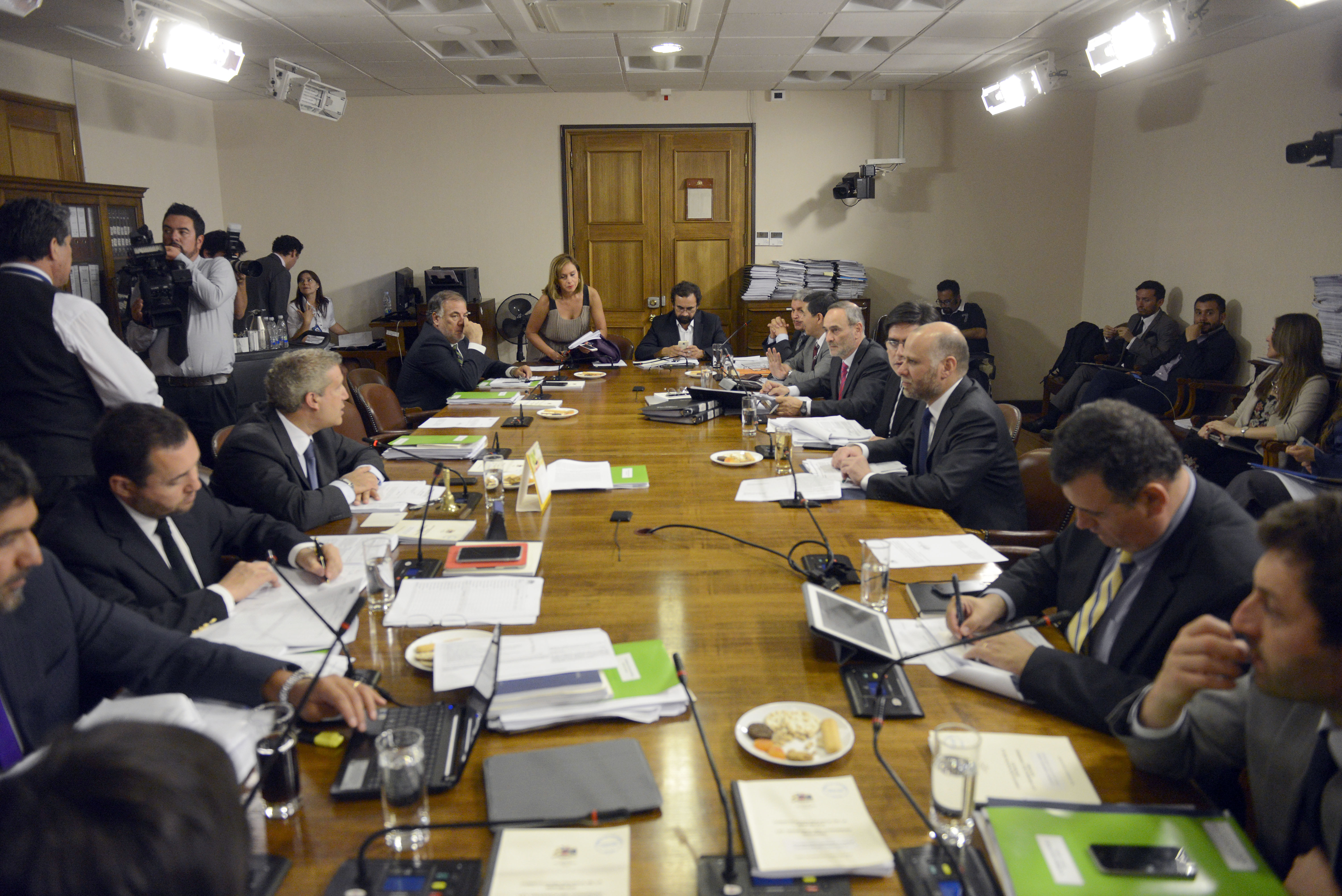 Ministro Elizalde llegó hasta el Congreso donde participa de la comisión Constitucion.